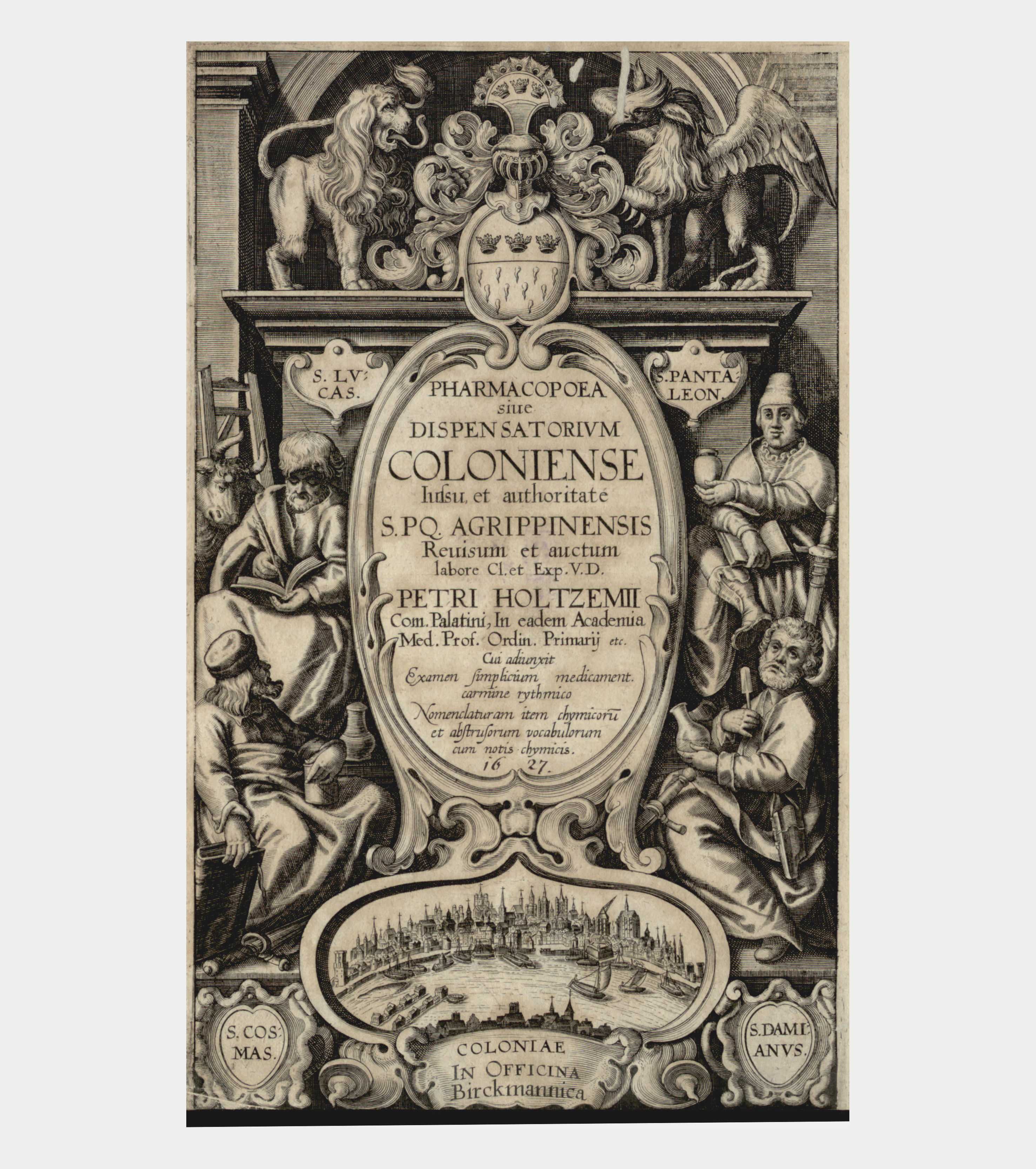 Titelblatt